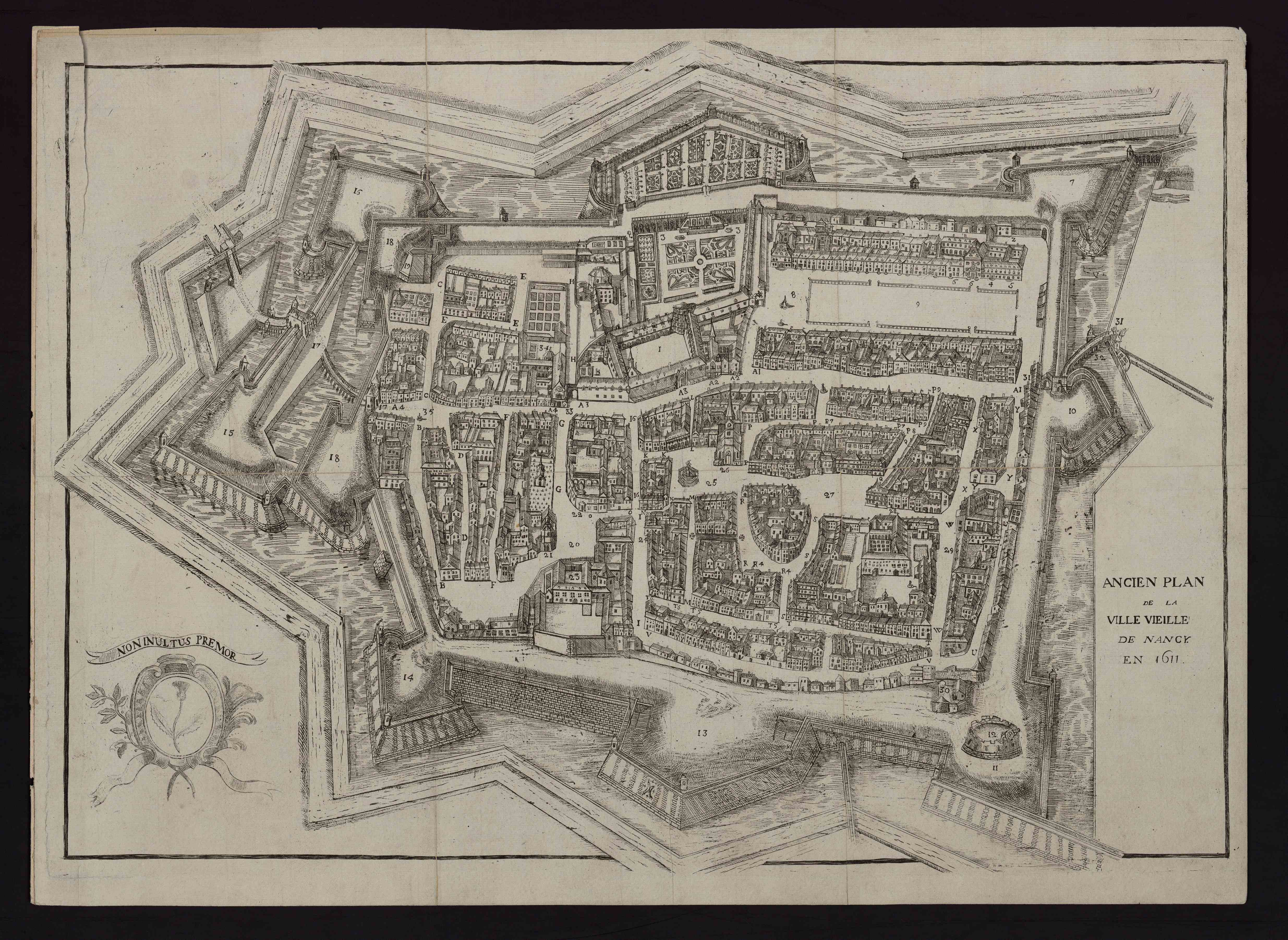 Détail de la ville-vieille médiévale de Nancy d'après le plan : "La ville de Nancy, Capitale de Lorraine, pourtraicte au vif comme elle est ceste année 1611." Commandé par Claude de la Ruelle, Secrétaire du Duc Charles III de Lorraine, dessiné par Ferri Brentel, et gravé par Herman de Loye en 1611.